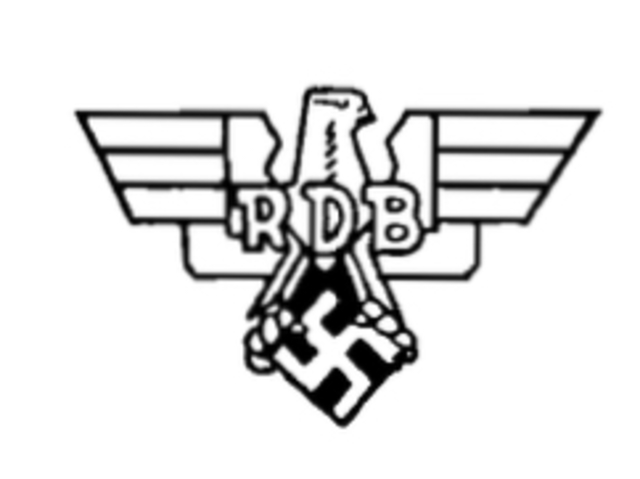 Logo RDB (Adler)